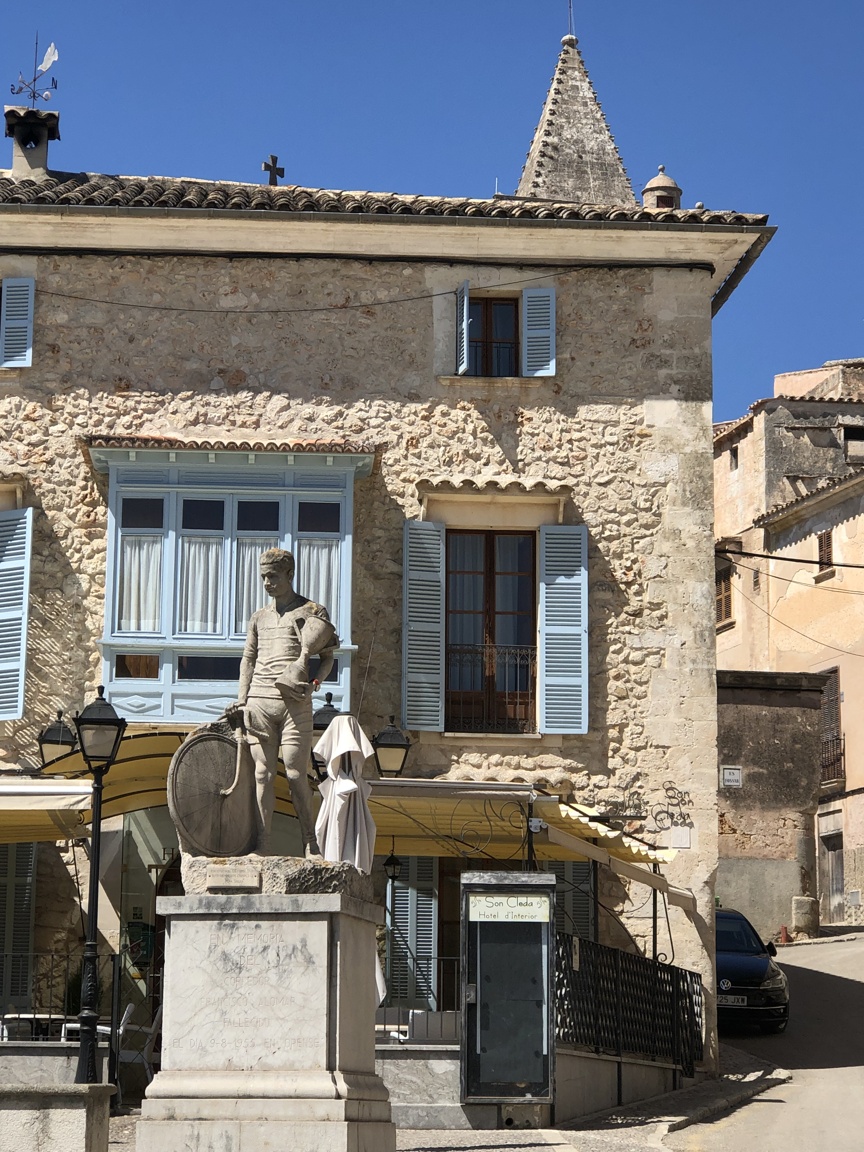 Escultura homenaje a Francesc Alomar en la Plaça del Fossar de Sineu